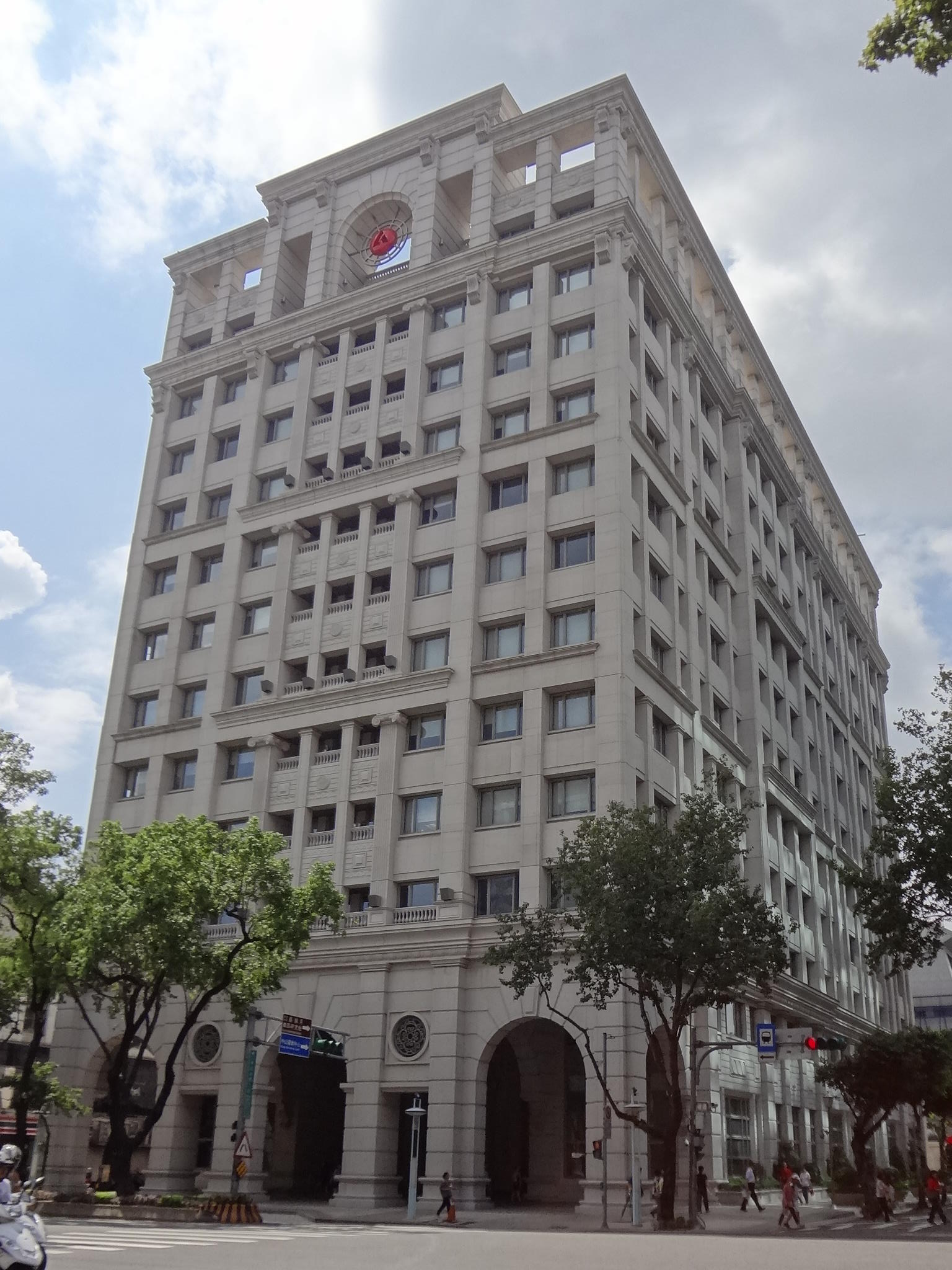 臺灣人壽金融總部大樓，位於臺灣臺北市中山區中山北路二段42號。